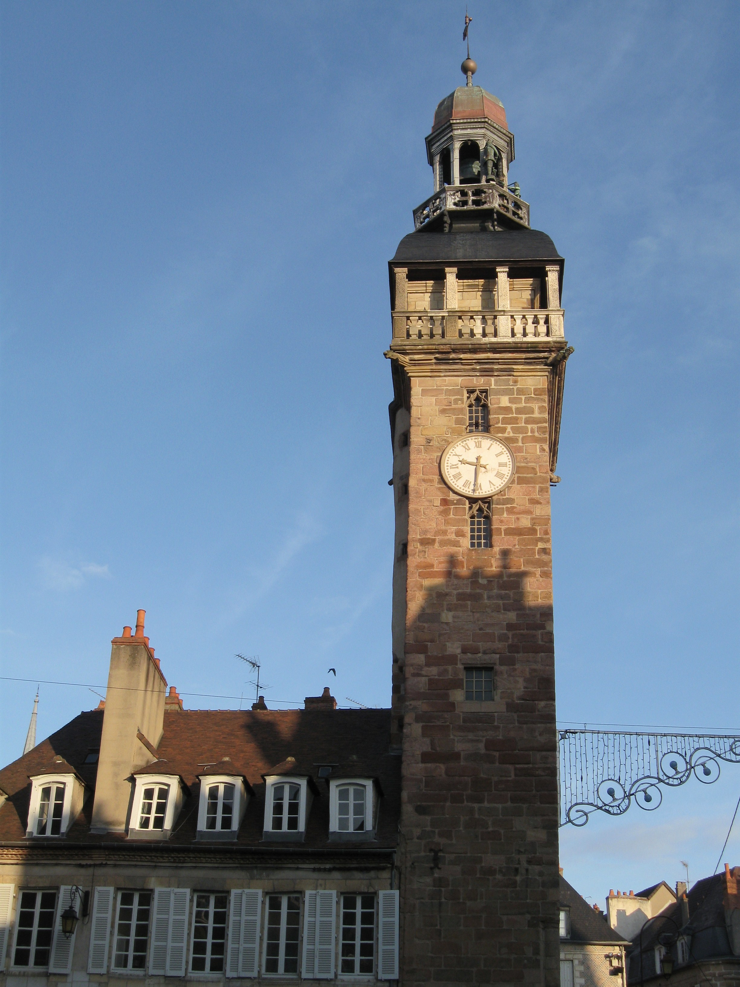 Tour Jacquemart, Moulins, Allier, France